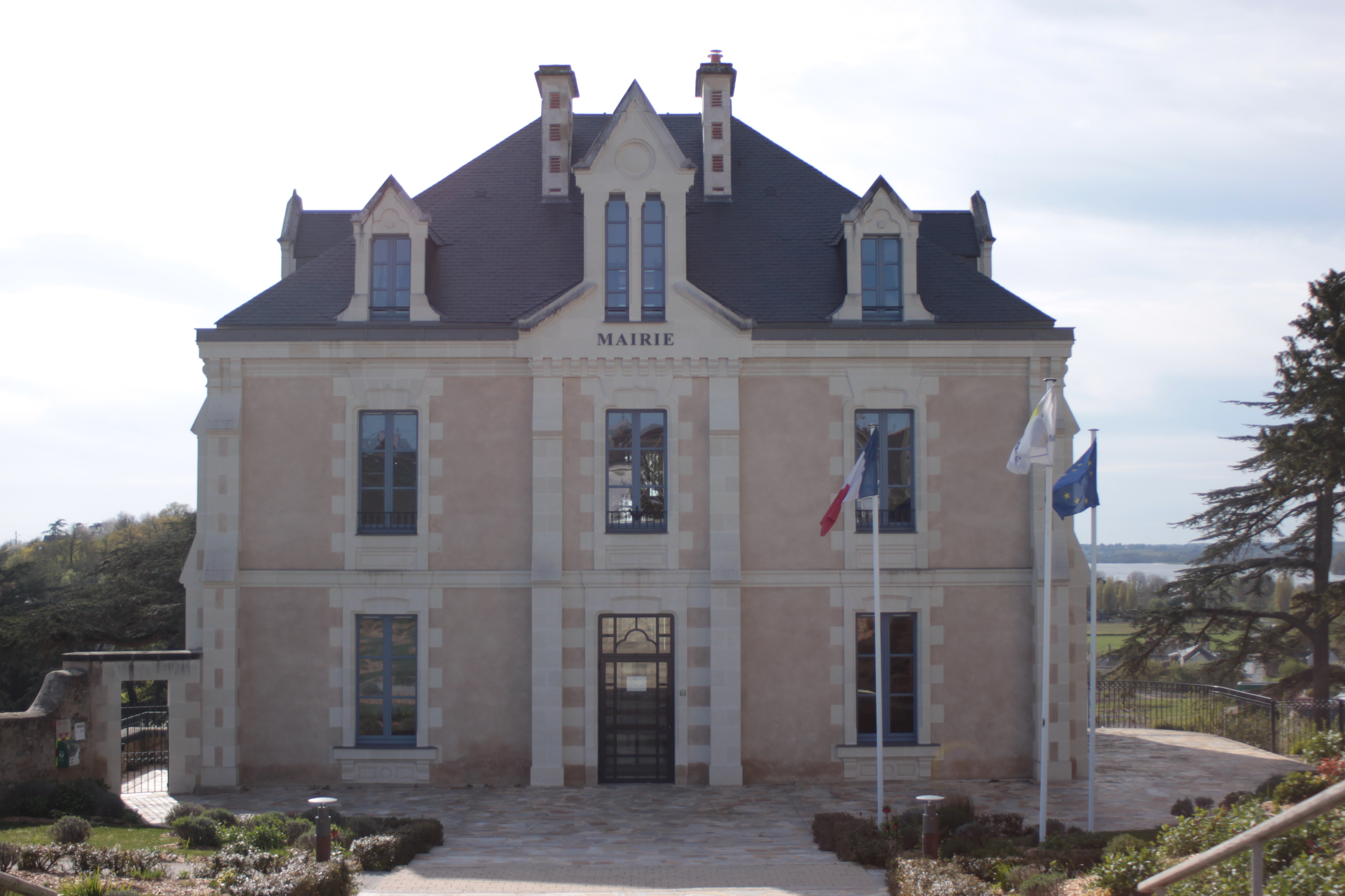 Mairie, Fr-49-Montjean.